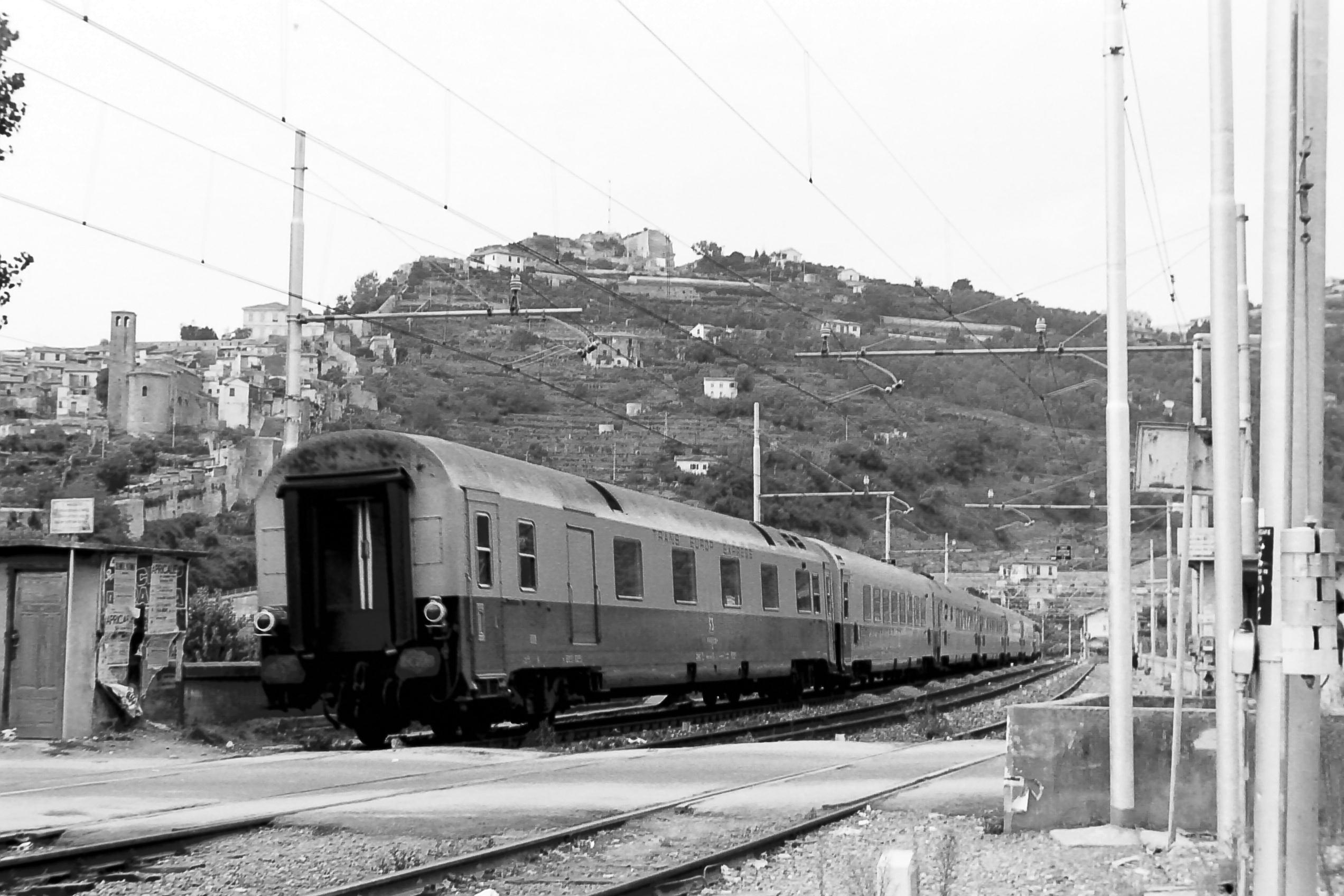 Coda del treno TEE "Ligure" Milano-Avignone appena partito da Ventimiglia. In ultima posizione la carrozza furgone generatore tipo Dz.